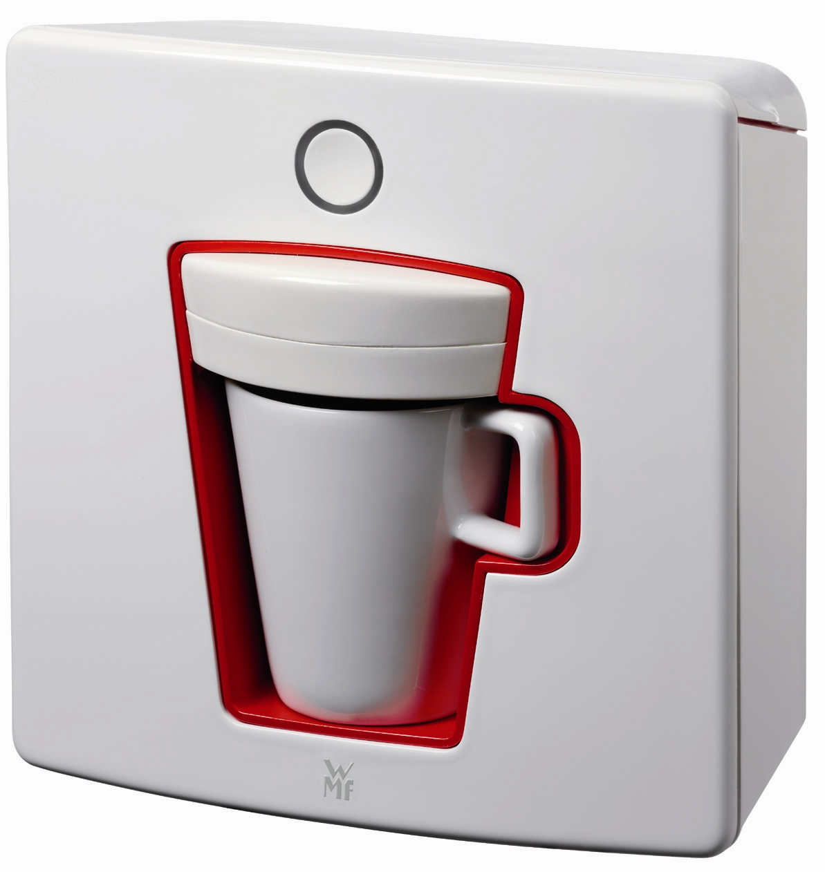 Die kleinste Kaffepad-Maschine der Welt: die WMF 1